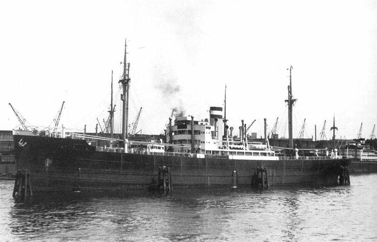 Der Motorfrachter Palatia der Hapag nach Fertigstellung 1928